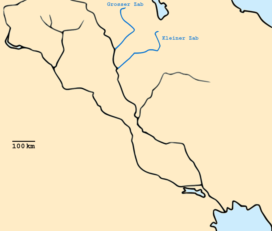 Der kleine und der große Fluss Zab im Nordirak